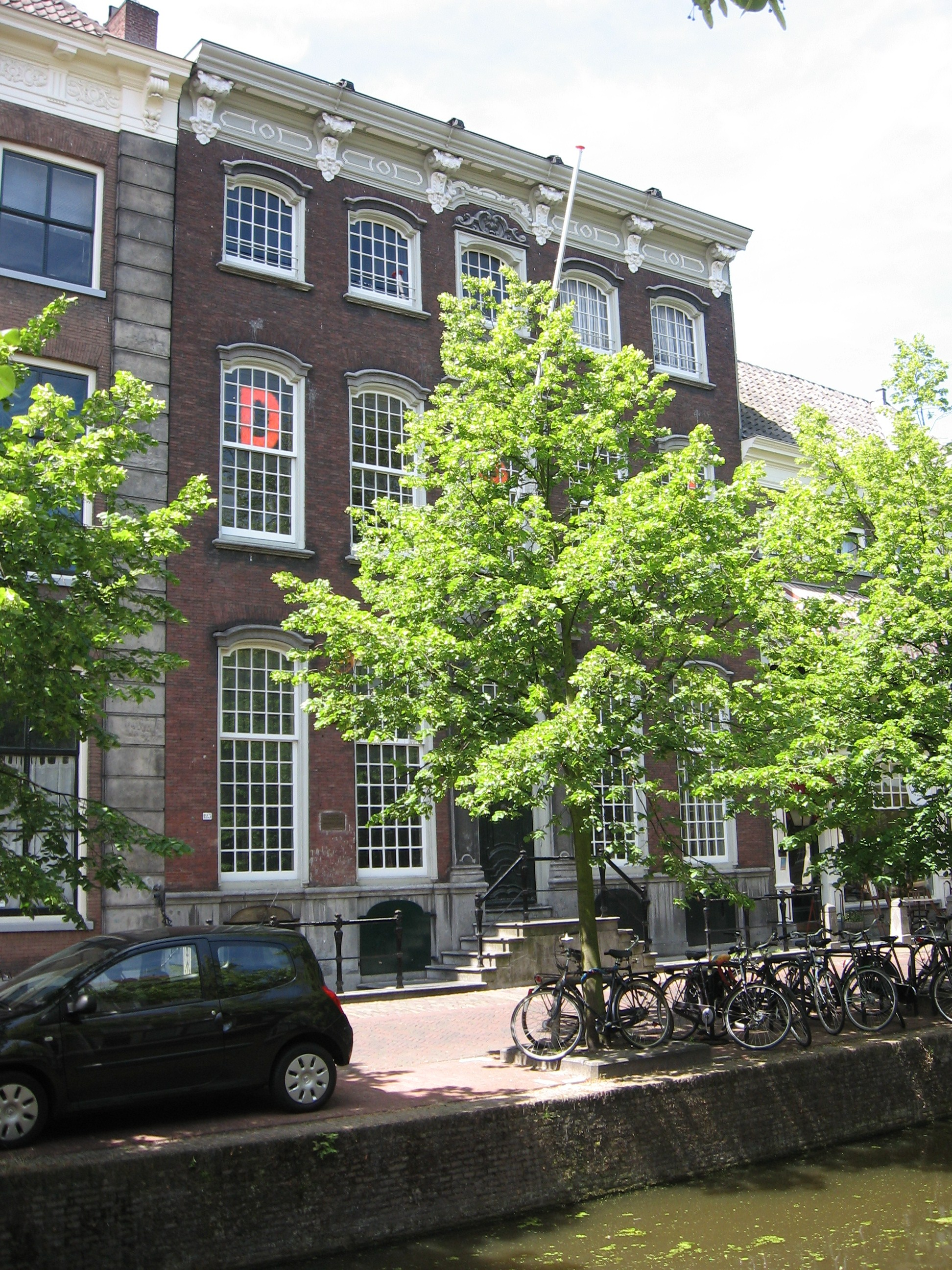 Delft - Oude Delft 123.jpg, rijksmonument